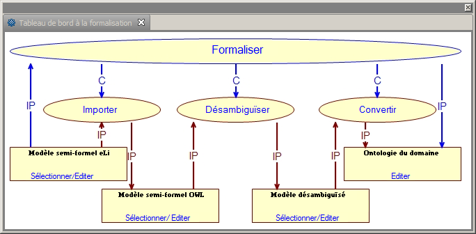 Interface OntoFORM